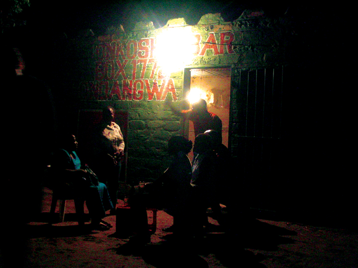 Cuca Shop in Okankolo (Namibia)